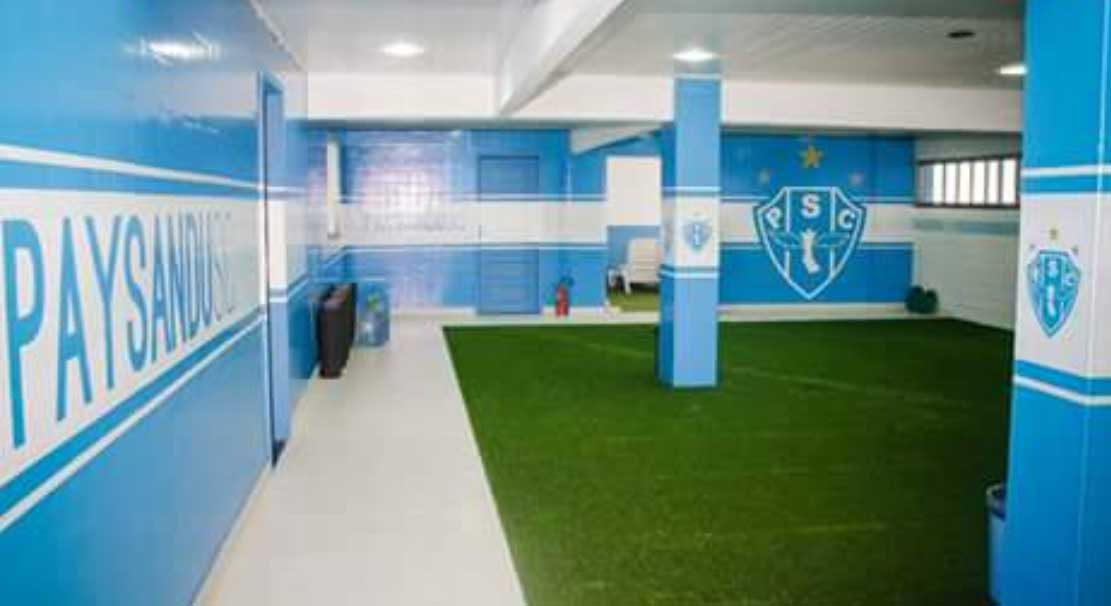 Concentração para os jogadores do papão